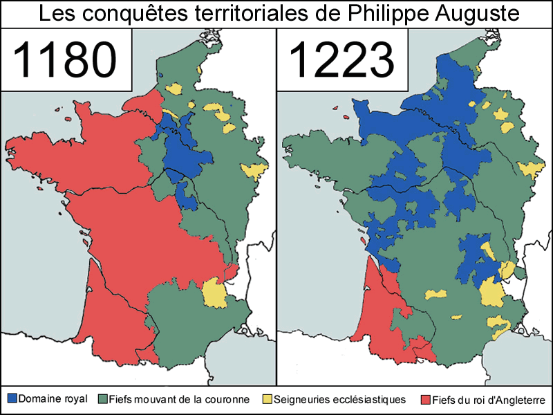 Les conquêtes territoriales de Philippe Auguste, entre son avènement (1180) et sa mort (1223).